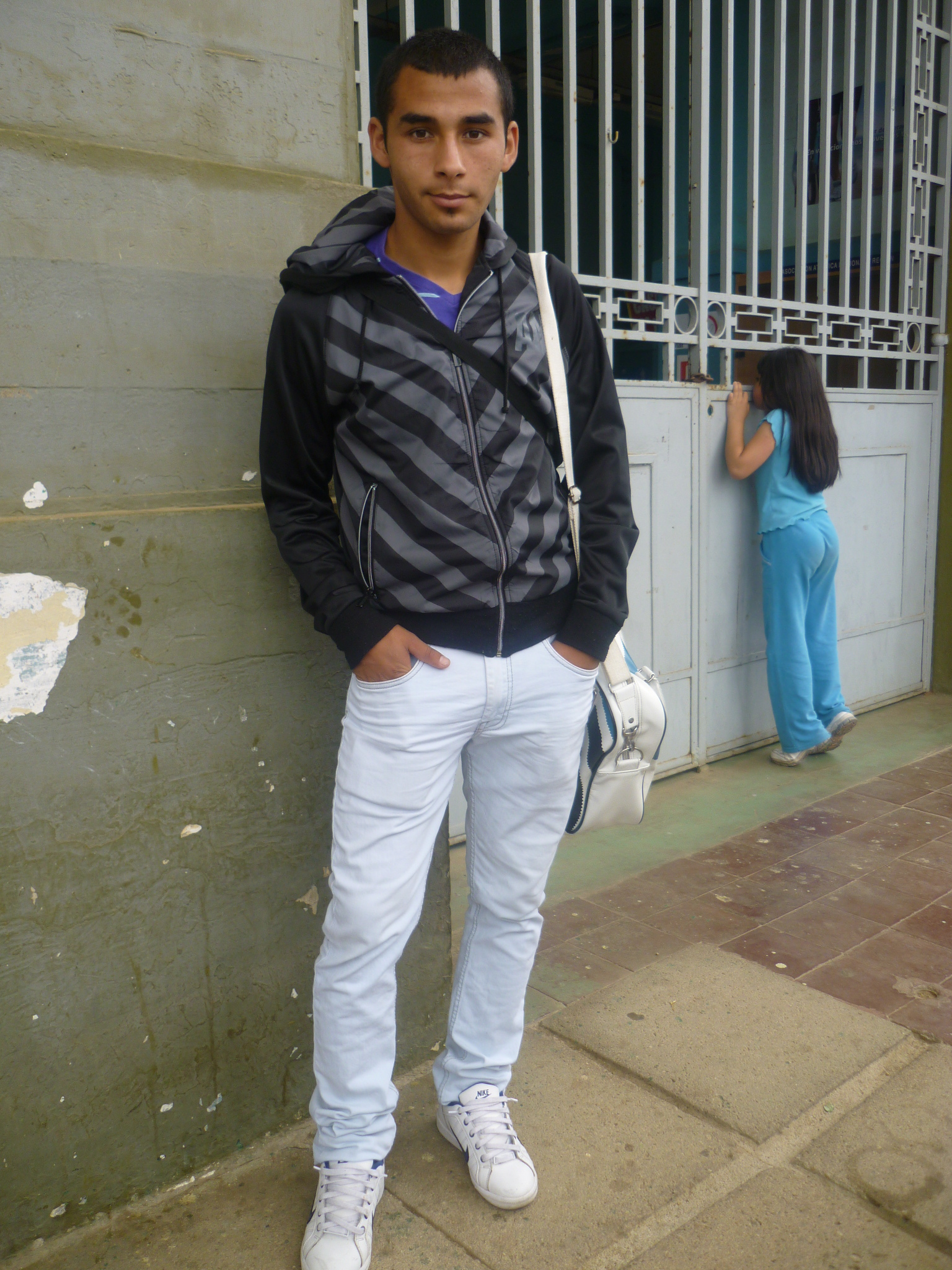 Fotografía de Álex González Arancibia, jugador de fútbol chileno del Santiago Wanderers de la Primera División de Chile.